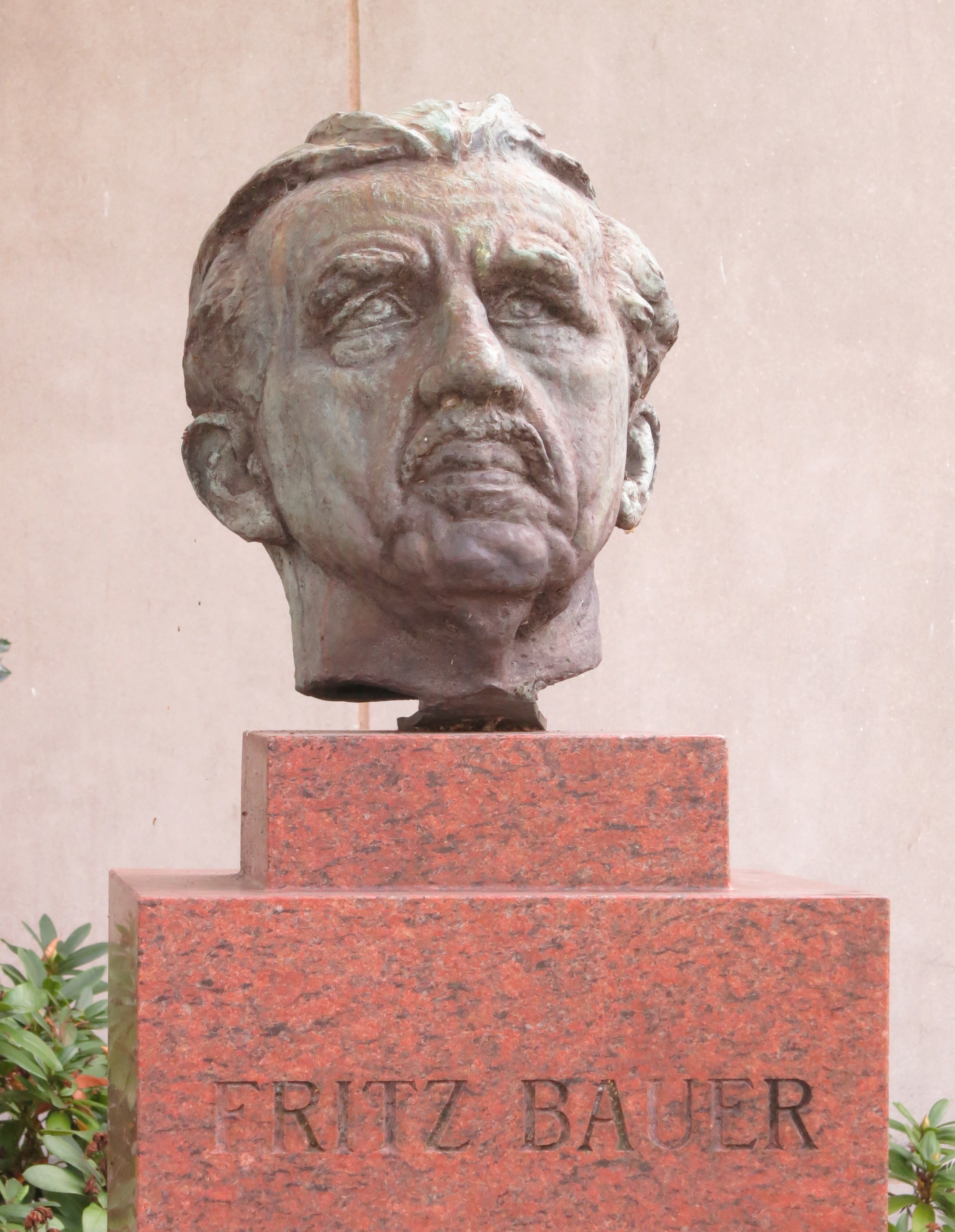 Porträtthuvud av Fritz Bauer i Malmö